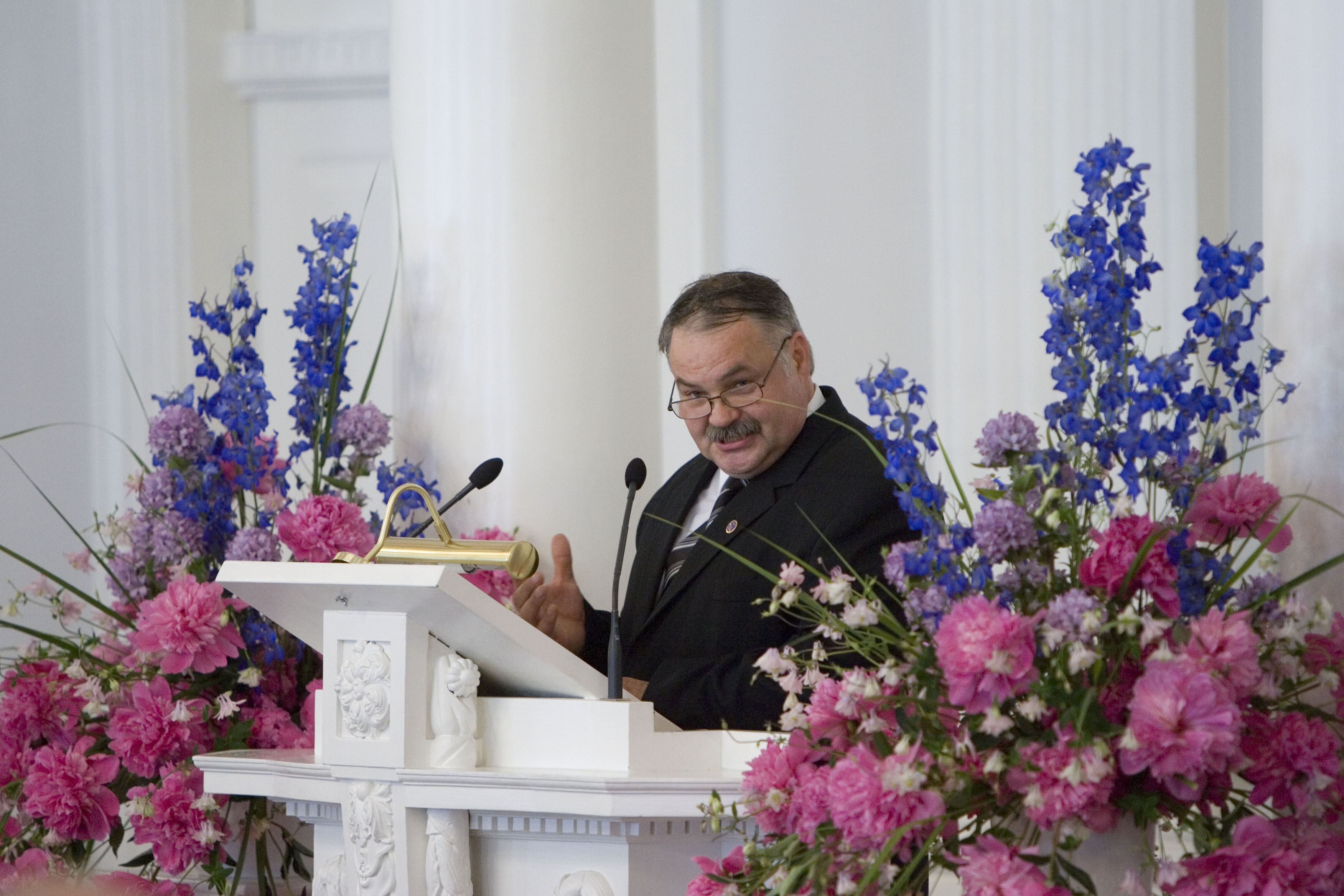 Tartu Ülikooli füüsika-keemiateaduskonna lõpuaktus TÜ aulas 22. juunil 2006. Esineb prof Enn Lust.